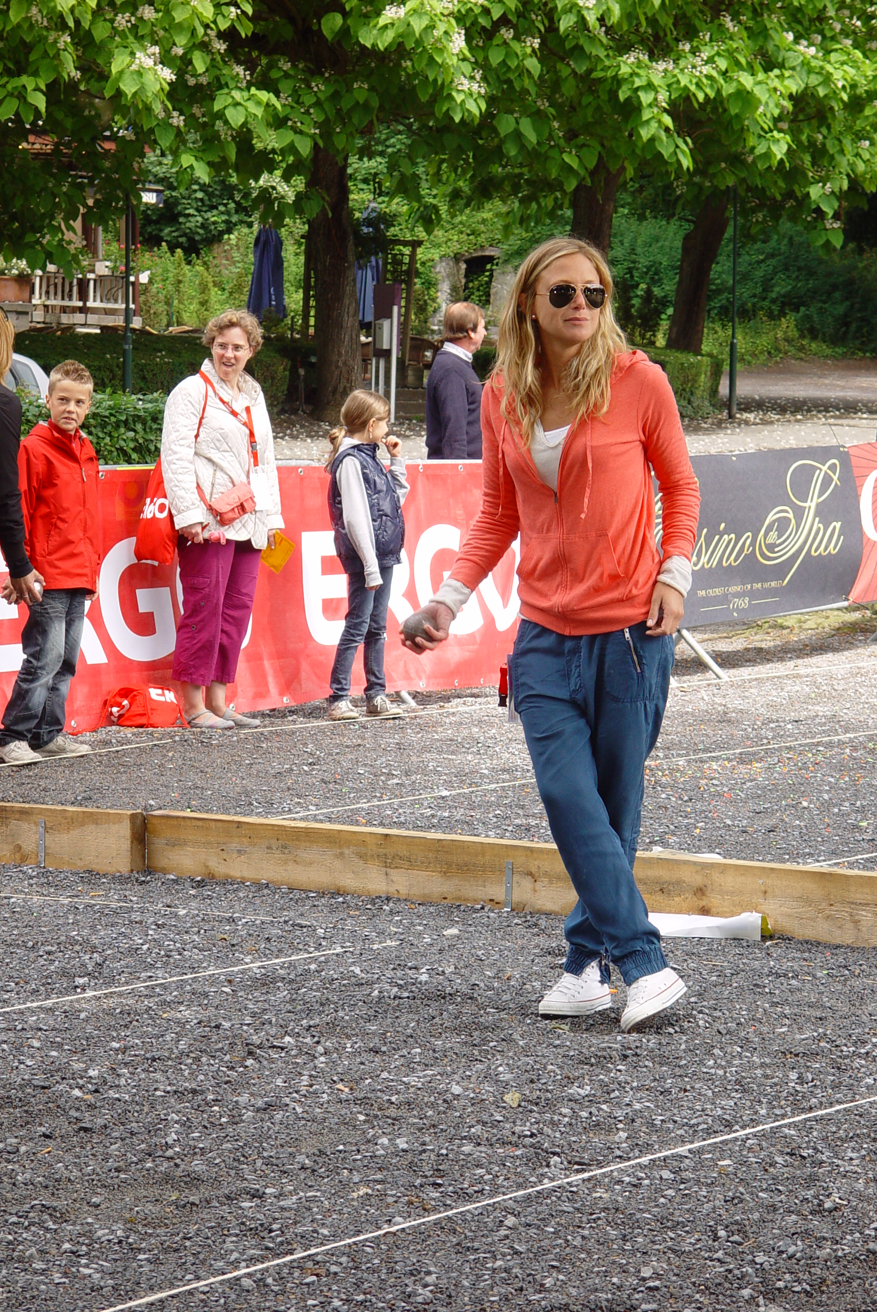 Julie TATON en 2011, au tournoi de pétanques des décideurs, à SPA.